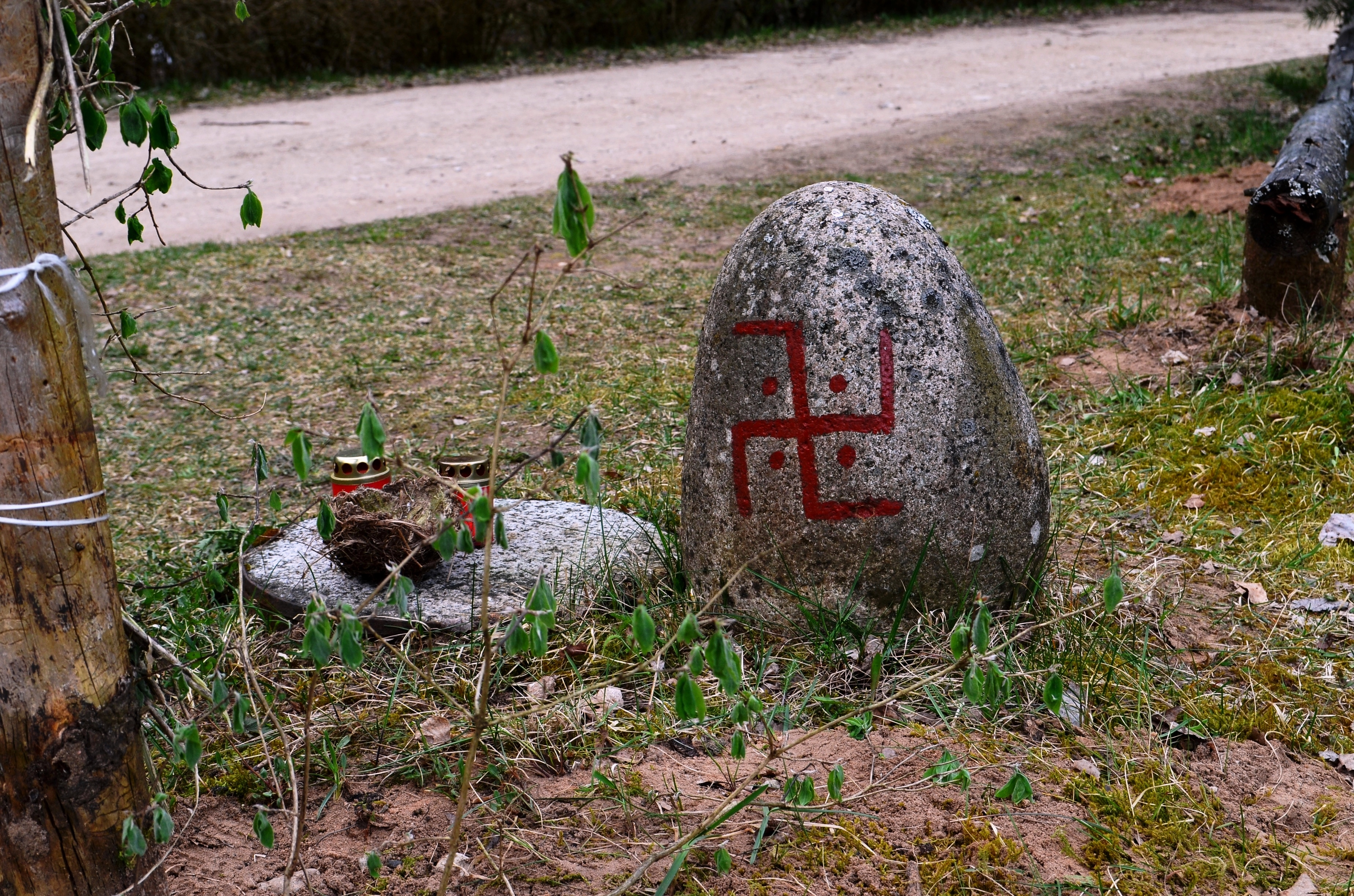 Sūkurėlis (svastika) Kulionyse, Molėtų raj.